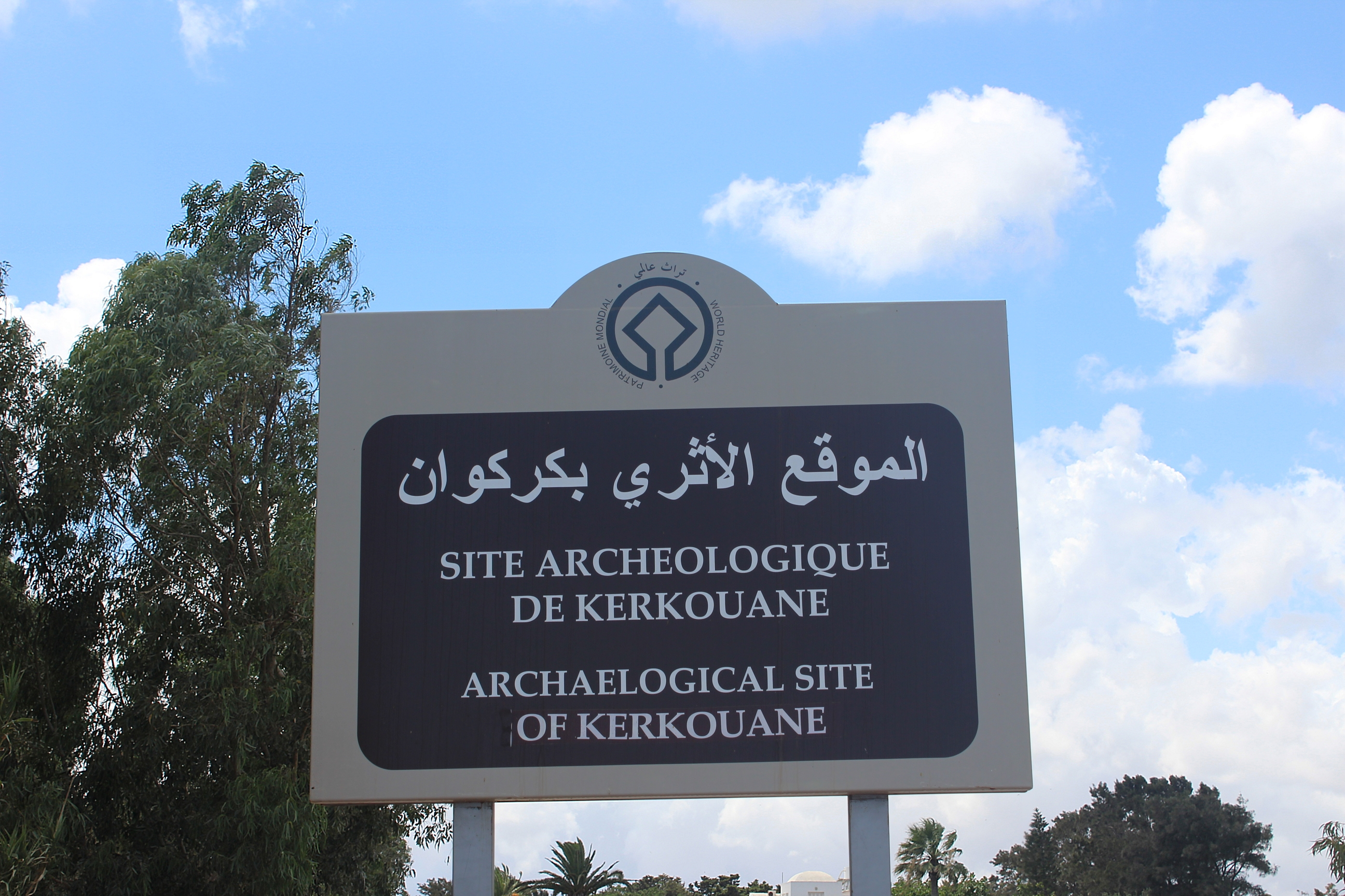 Kerkouane (également appelé Tamezrat) est un site du patrimoine mondial depuis 1985.